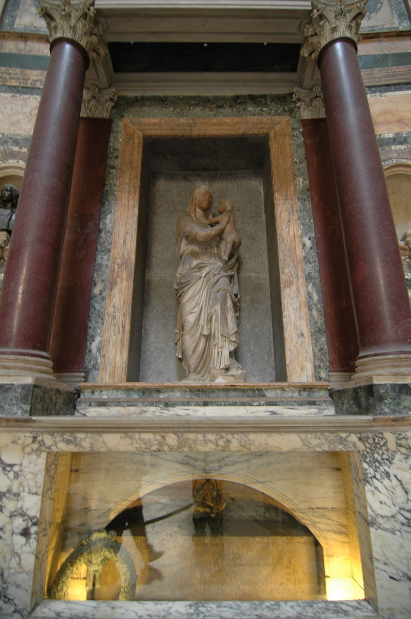 La Madonna del Sasso è opera del Lorenzetto, commissionata dallo stesso Raffaello per la propria tomba.